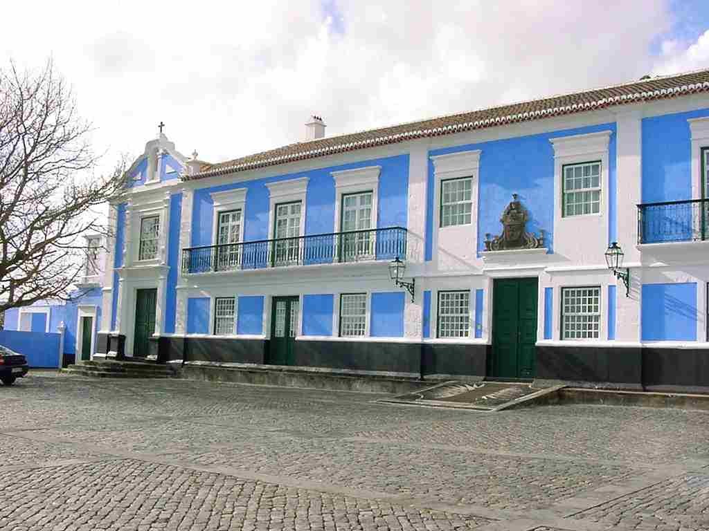 Solar da Madre de Deus1